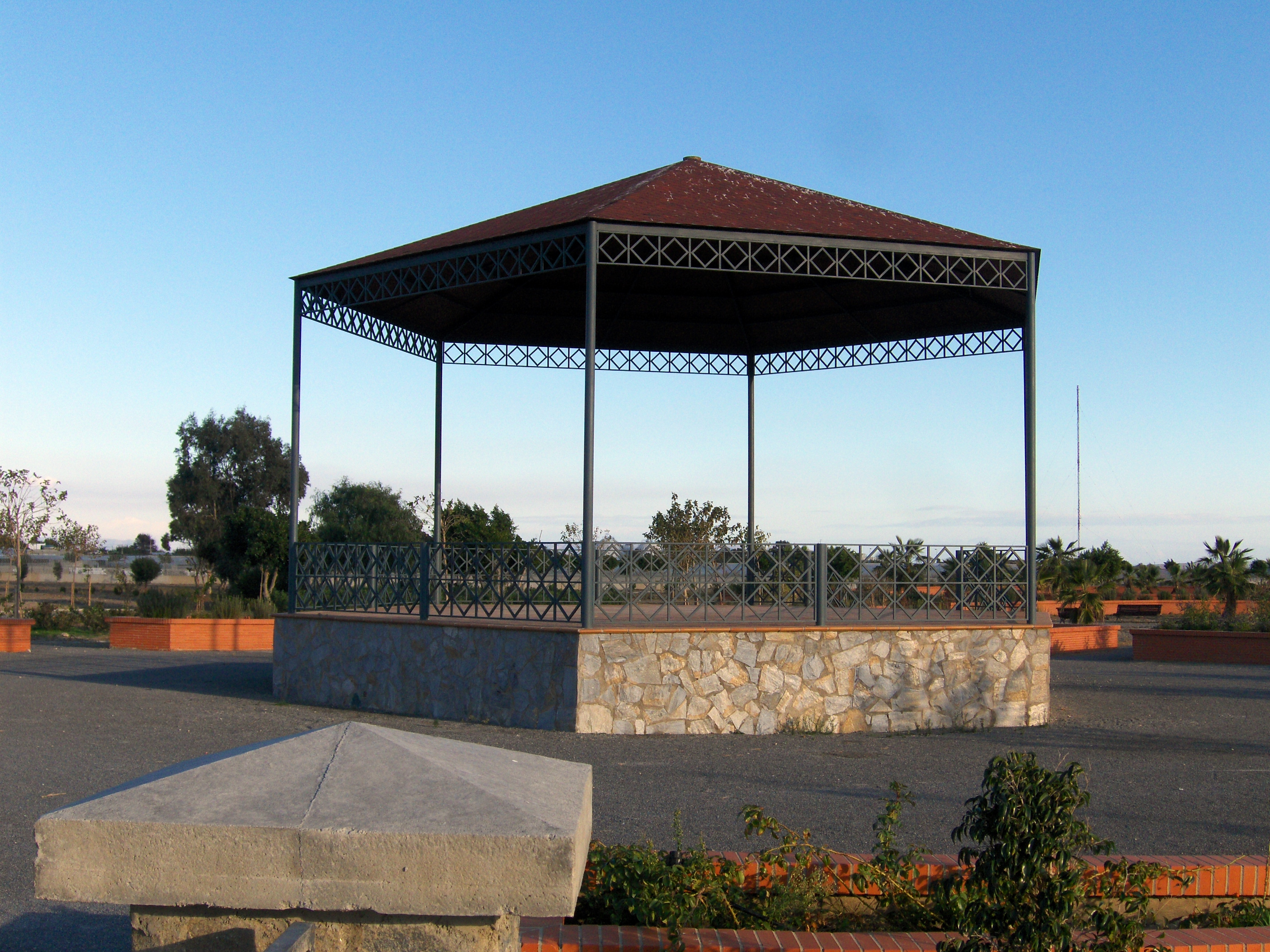 Quiosco en el Parque del Andarax